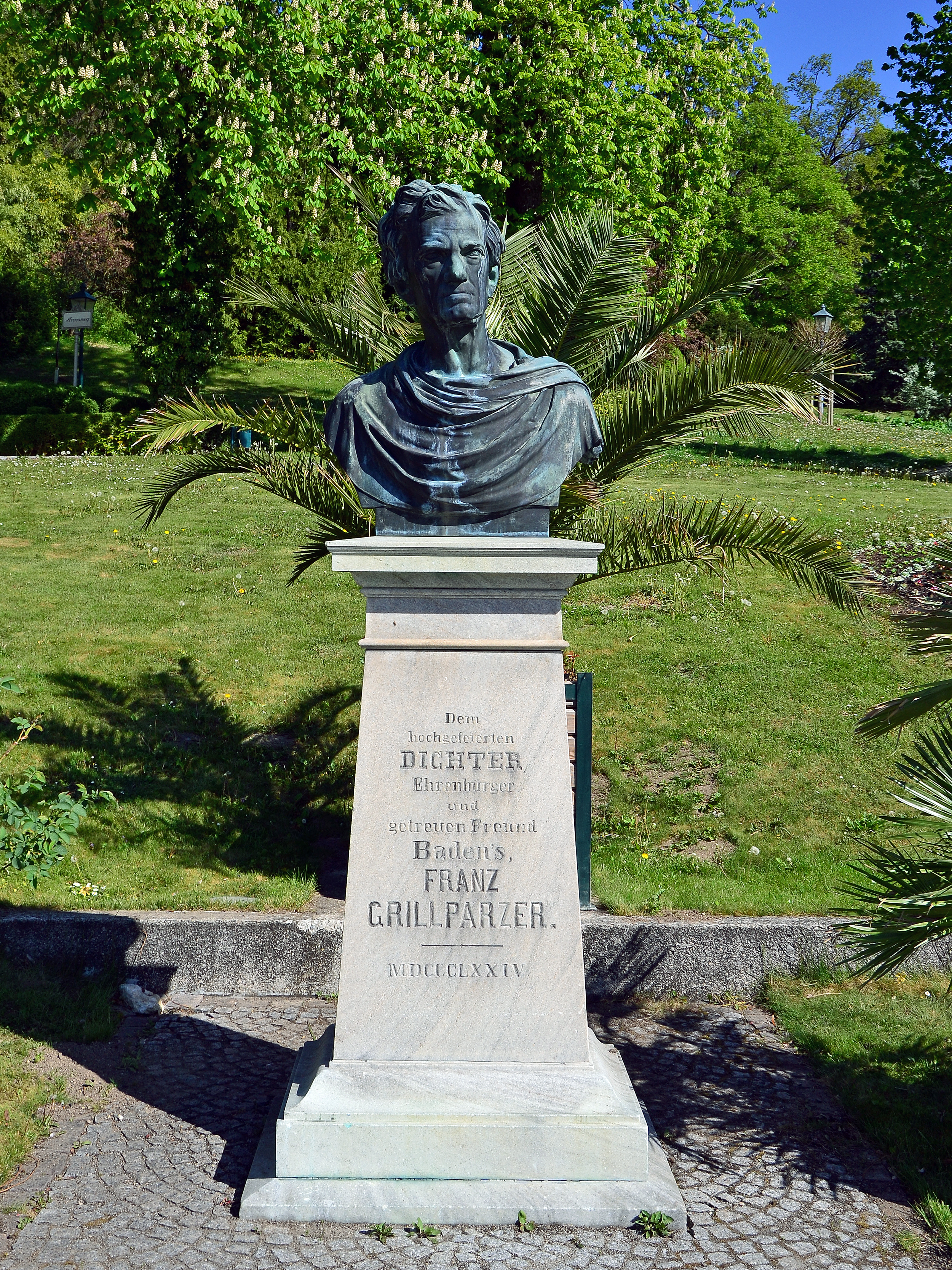 Bauten und Gartenbaudenkmäler im Badener Kurpark